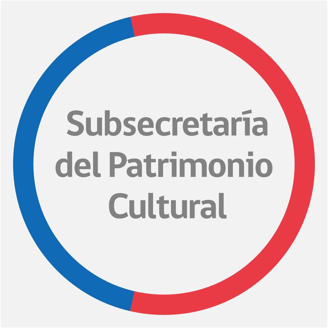 Logo de la Subsecretaría del Patrimonio Cultural de Chile